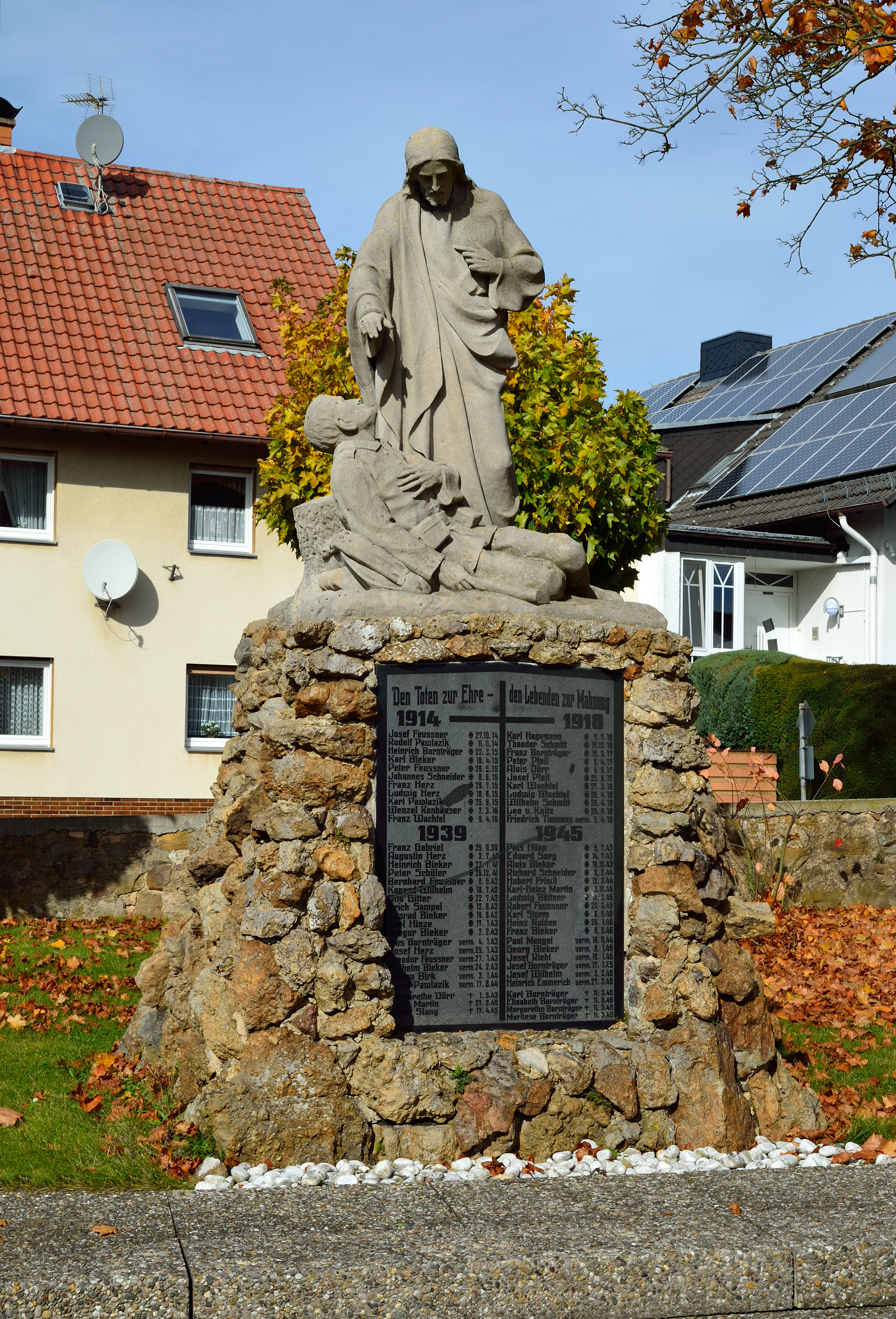 Weltkriegedenkmal in Rüdigheim (Amöneburg)